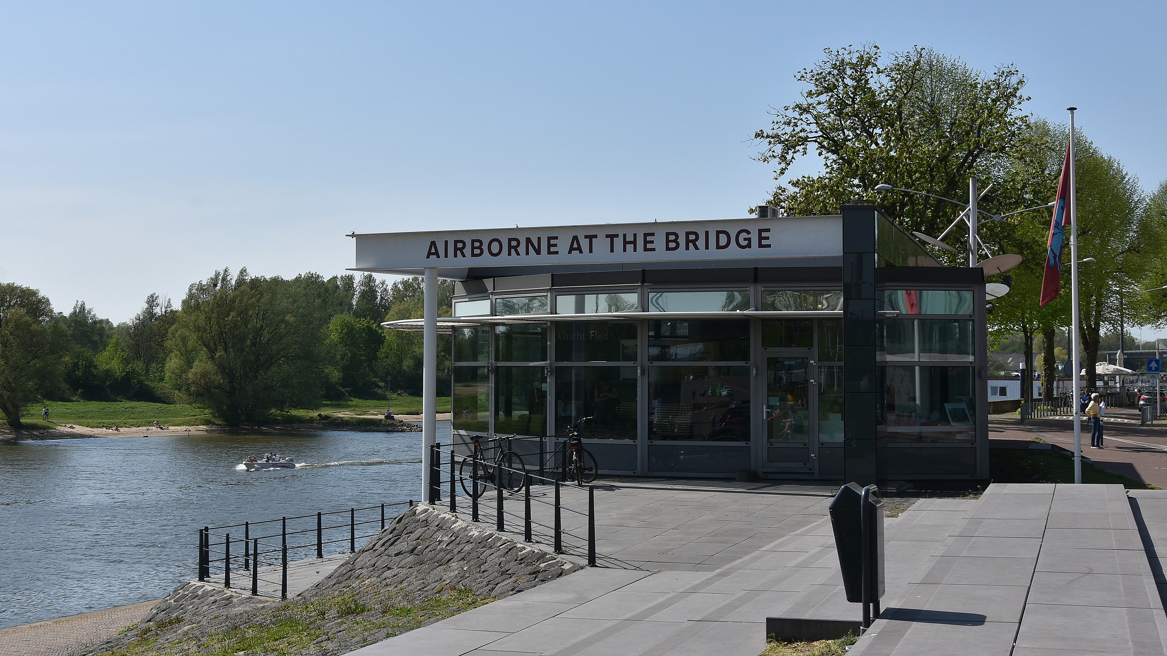 Airborne at the Bridge Arnhem 22-04-2019 14-02-38